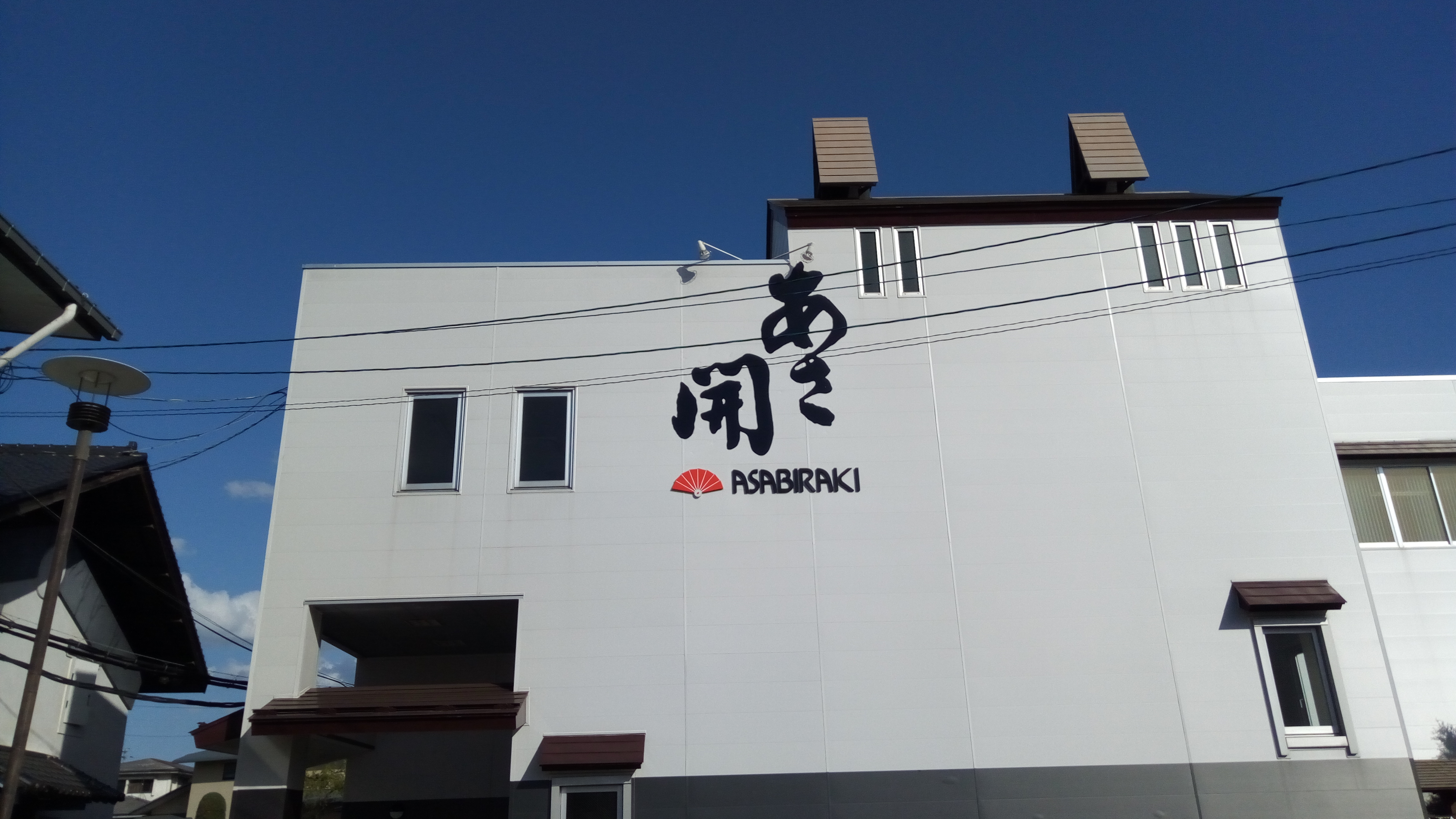 酒造あさ開（盛岡市）